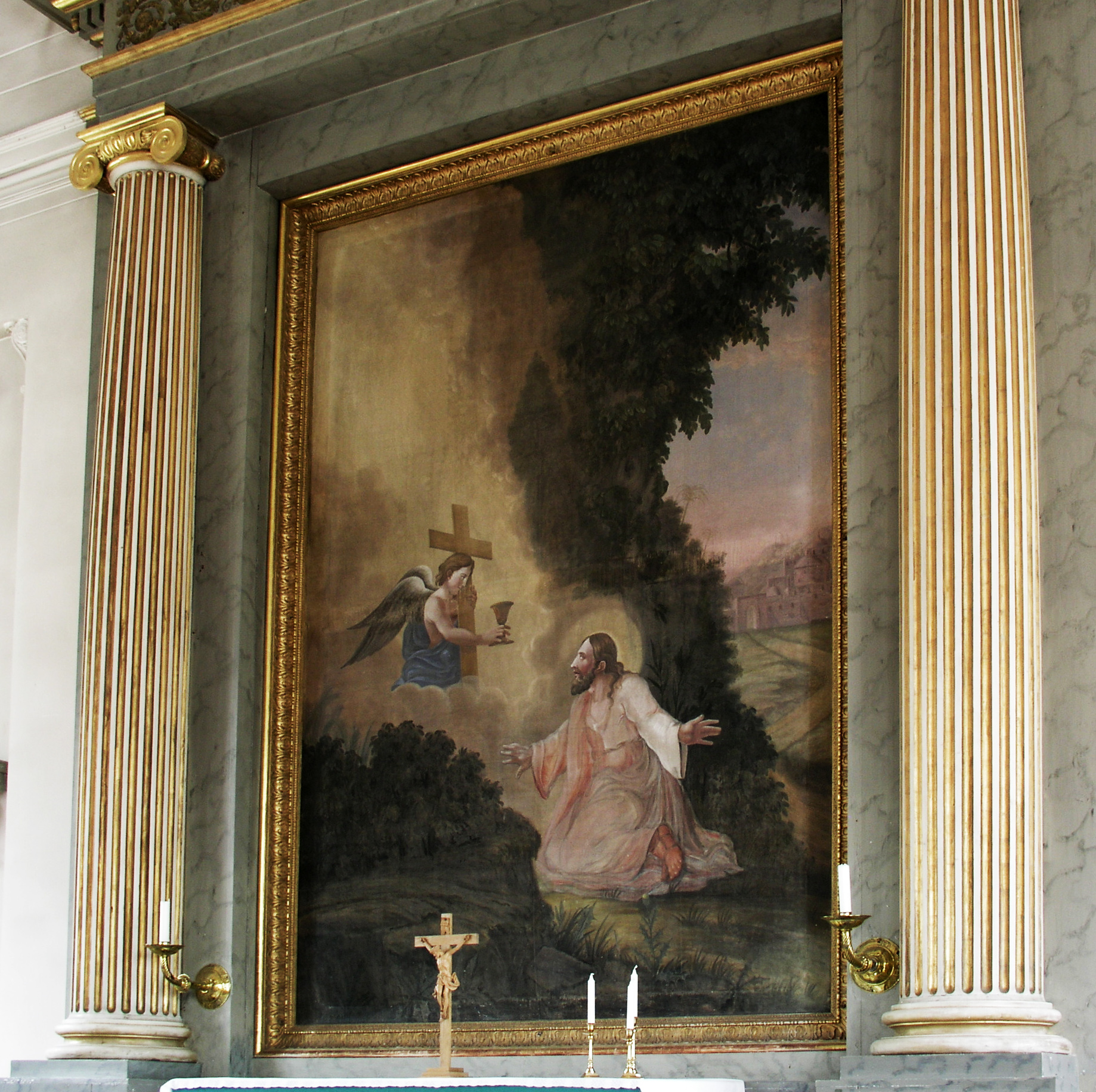 Röks kyrka, Altar piece